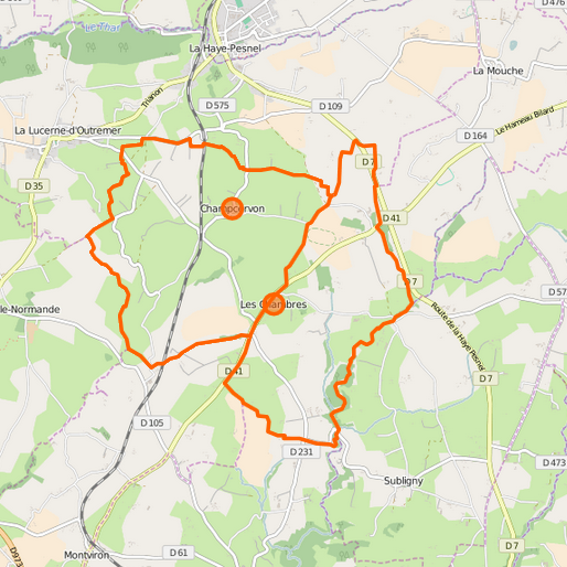 Carte de la commune nouvelle et ses communes déléguées